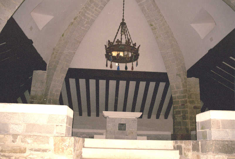 Mesa de Roldán en Roncesvalles en la provincia de Navarra, (España). Tomada por JMSE el 8 de julio de 2003 y cedida a Wikipedia. Categoría: España (imagen) Categoría: Monumentos (imagen)